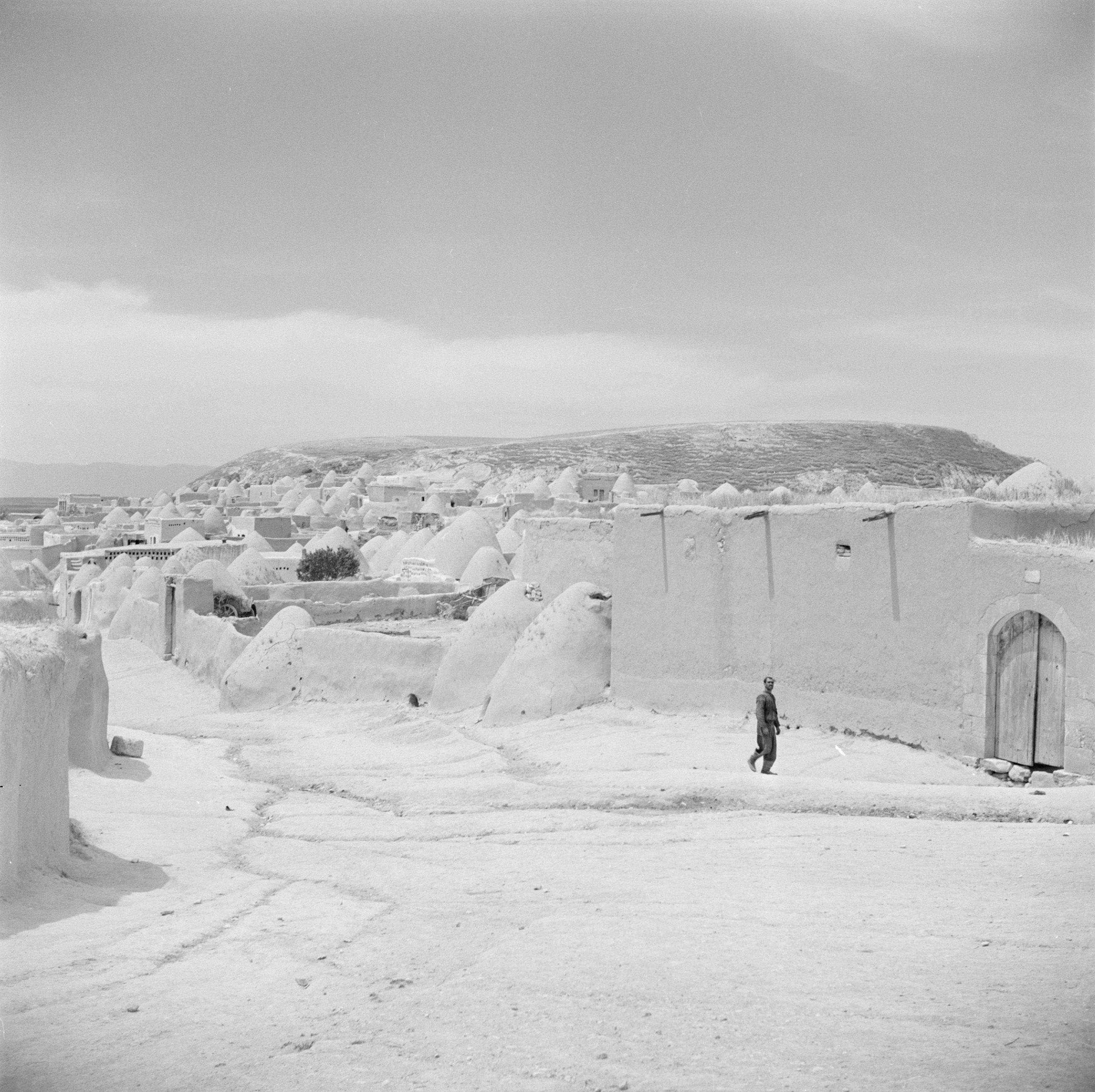 Collectie / Archief : Fotocollectie Van de Poll Reportage / Serie : Midden-Oosten 1950-1955: Syrië Beschrijving : Dorp in de omgeving van Khan Sheikhun Datum : 1950 Locatie : Khan Sheikhun, Syrië Trefwoorden : architectuur, dorpen, panorama Fotograaf : Poll, Willem van de Auteursrechthebbende : Nationaal Archief Materiaalsoort : Negatief (zwart/wit) Nummer archiefinventaris : bekijk toegang 2.24.14.02 Bestanddeelnummer : 255-5984